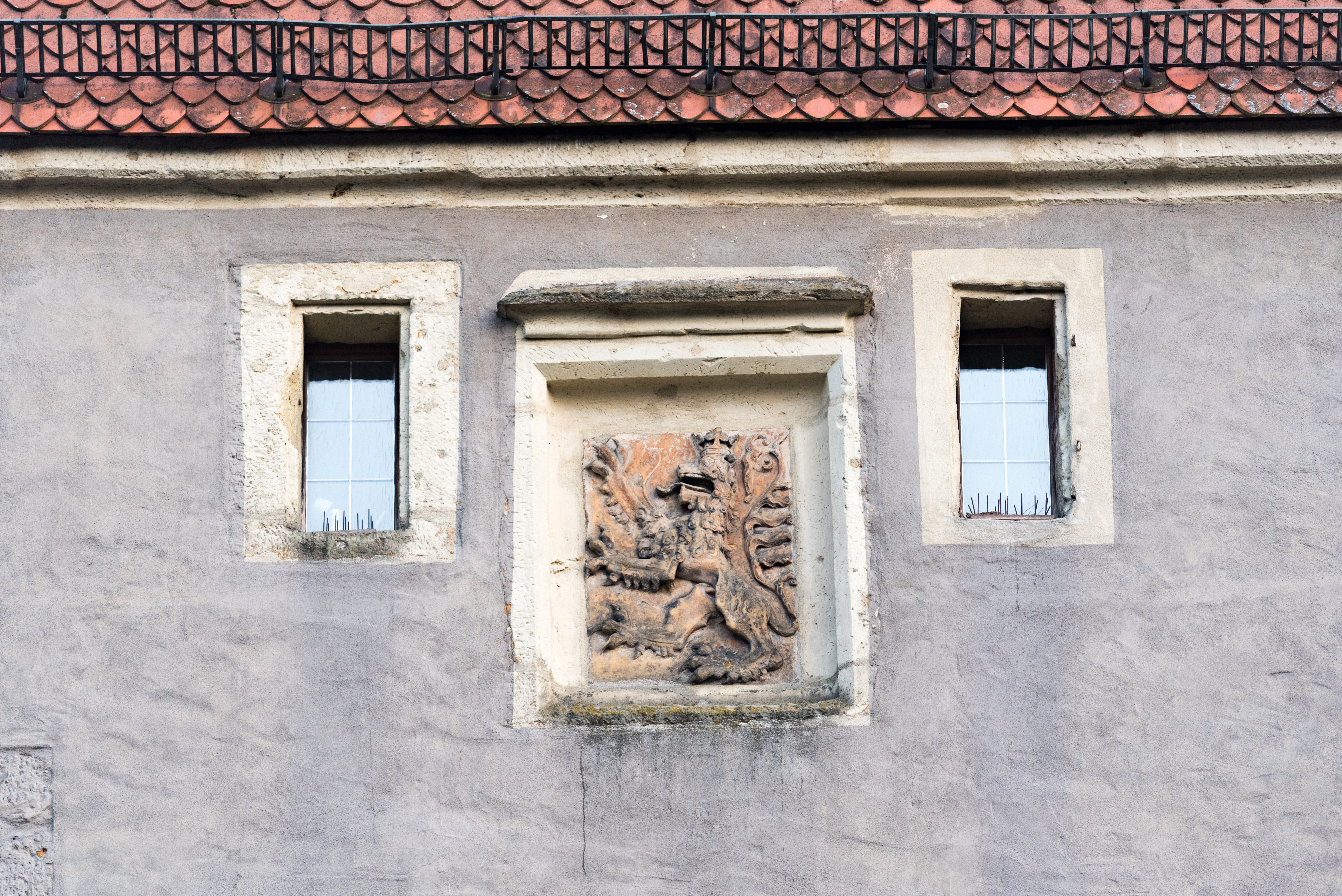 Amberg, Stadtbefestigung, Jesuitenfahrt 6, 8, Vilstor